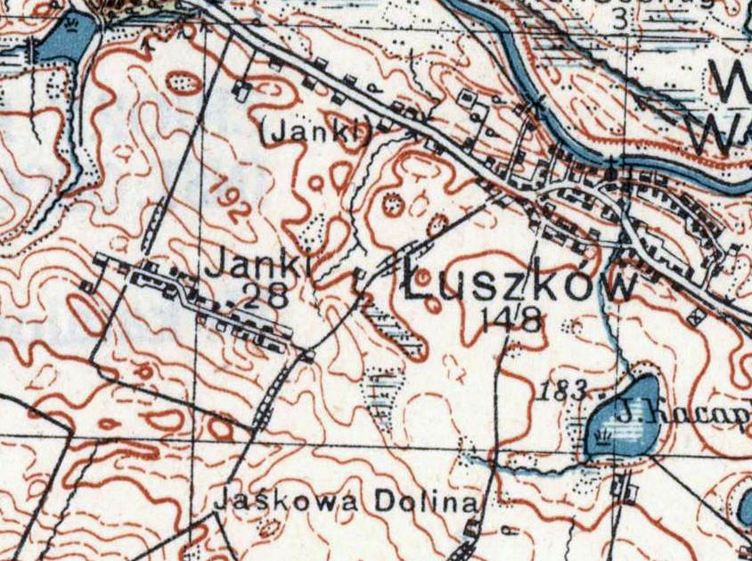 Wojskowa mapa okolic Janek (gmina Horodło) z 1933, wydawca Wojskowy Instytut Geograficzny, typ IV, Wzór 1931, siatka QS co 2 km, południk zerowy Greenwich, 4-kolorowa (treść podstawowa - czarny, wody - niebieski, lasy - zielony, warstwice - brązowy), kolory dodatkowe: czerwony - szlaki turystyczne, fioletowy - cieniowanie.